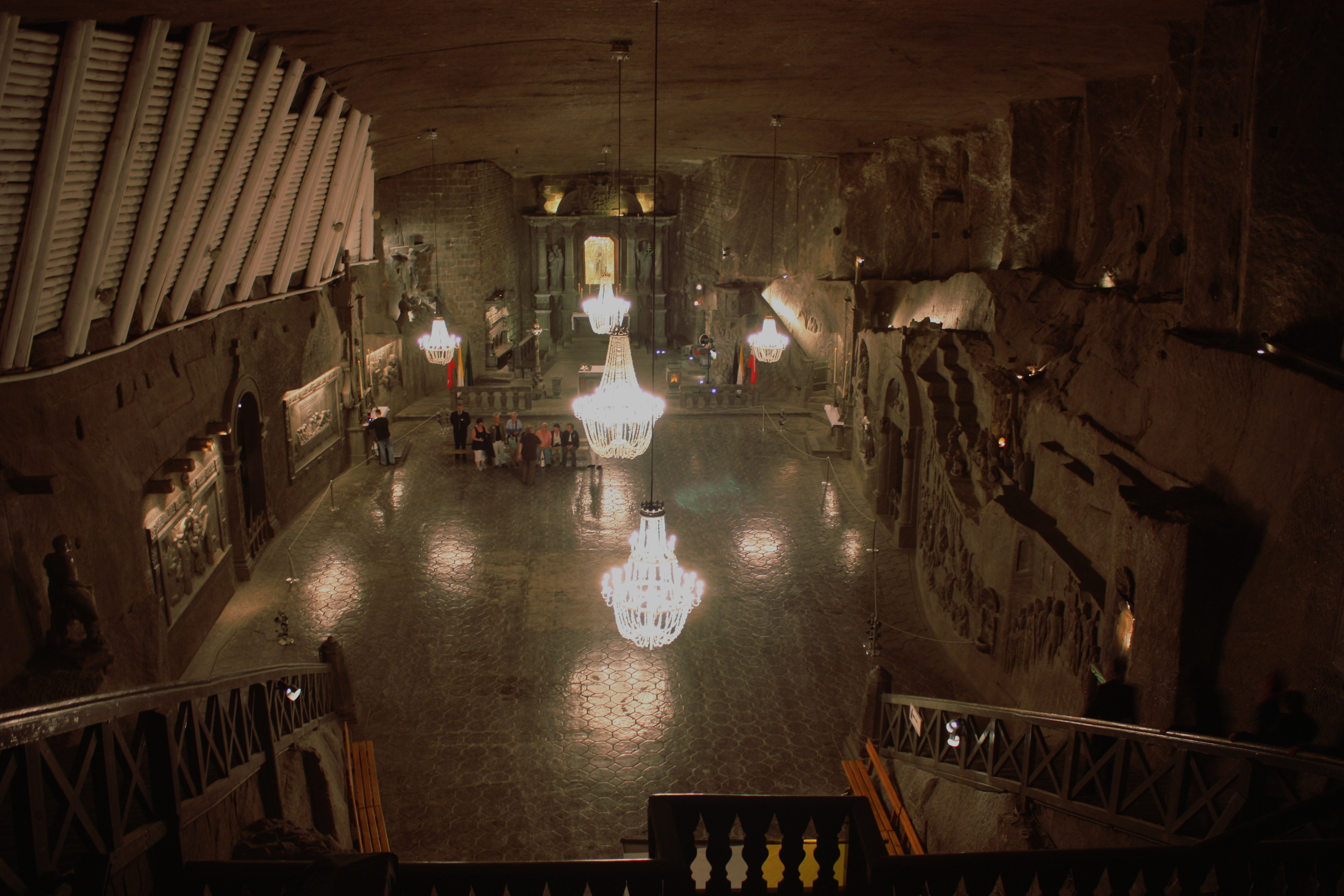 Wieliczka, St Kinga's Chapel